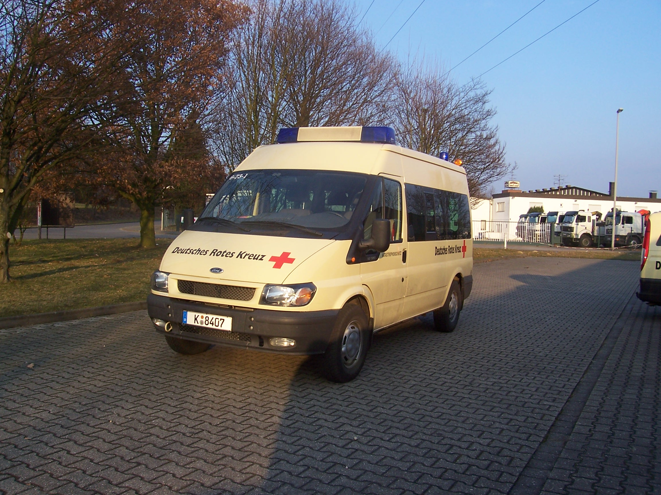 Betreuungskombi (BtKombi) des Zivilschutzes, wie er vom Bund zur Verfügung gestellt wird. Hier ein Fahrzeug des DRK Köln auf dem Parkplatz des Katastrophenschutzzentrums Nordrhein in Mönchen-Gladbach.